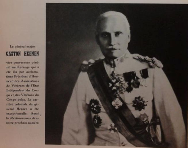 Union Royale Belge pour le Congo et les pays d'Outremer Revue Belgo-Congolaise Illustrée, No 7, juillet 1963. En couverture: Gaston Heenen